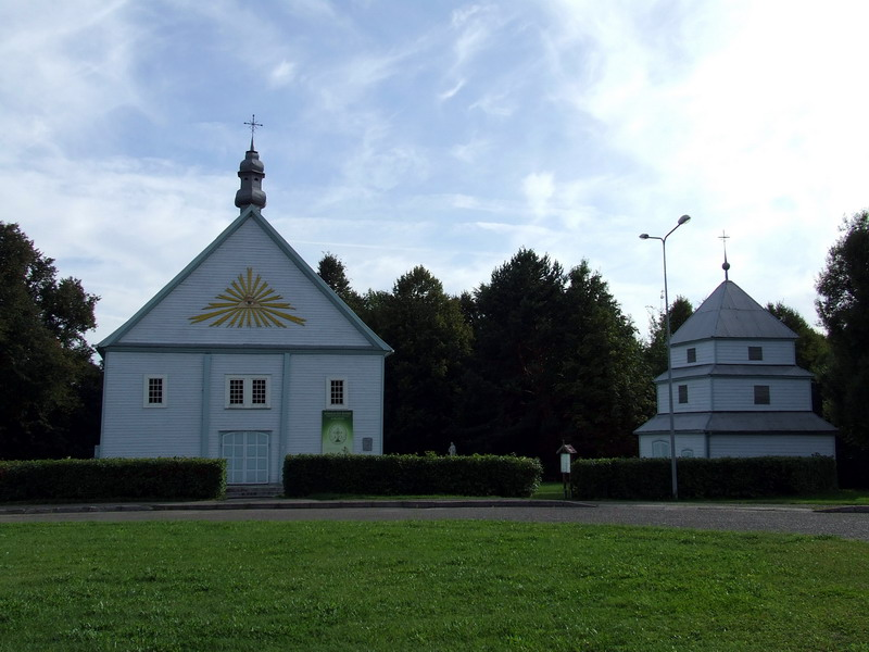 Šv. arkangelo Mykolo church, Rumšiškės, Lithuania.